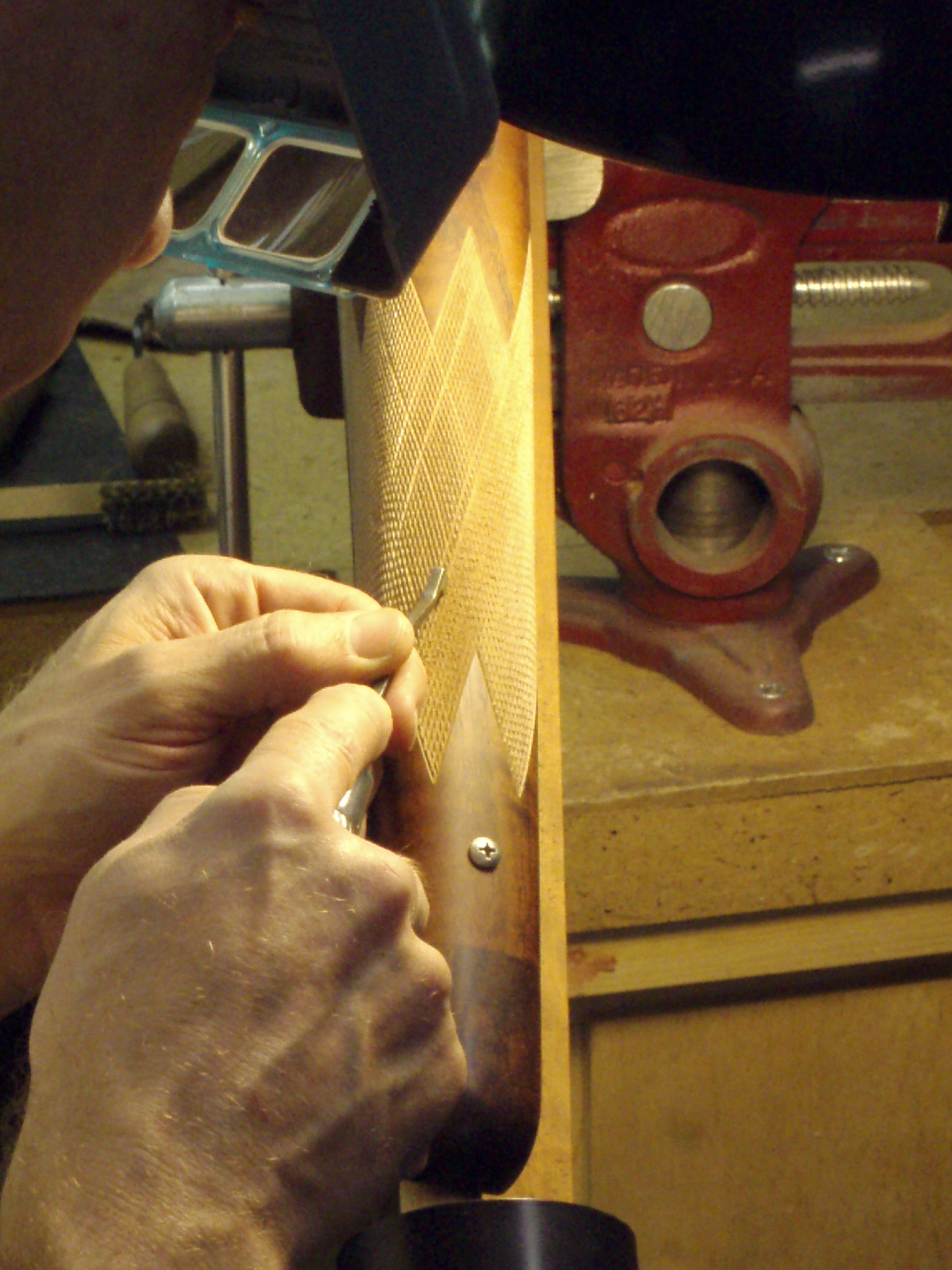 Gunsmith checkering rifle stock.